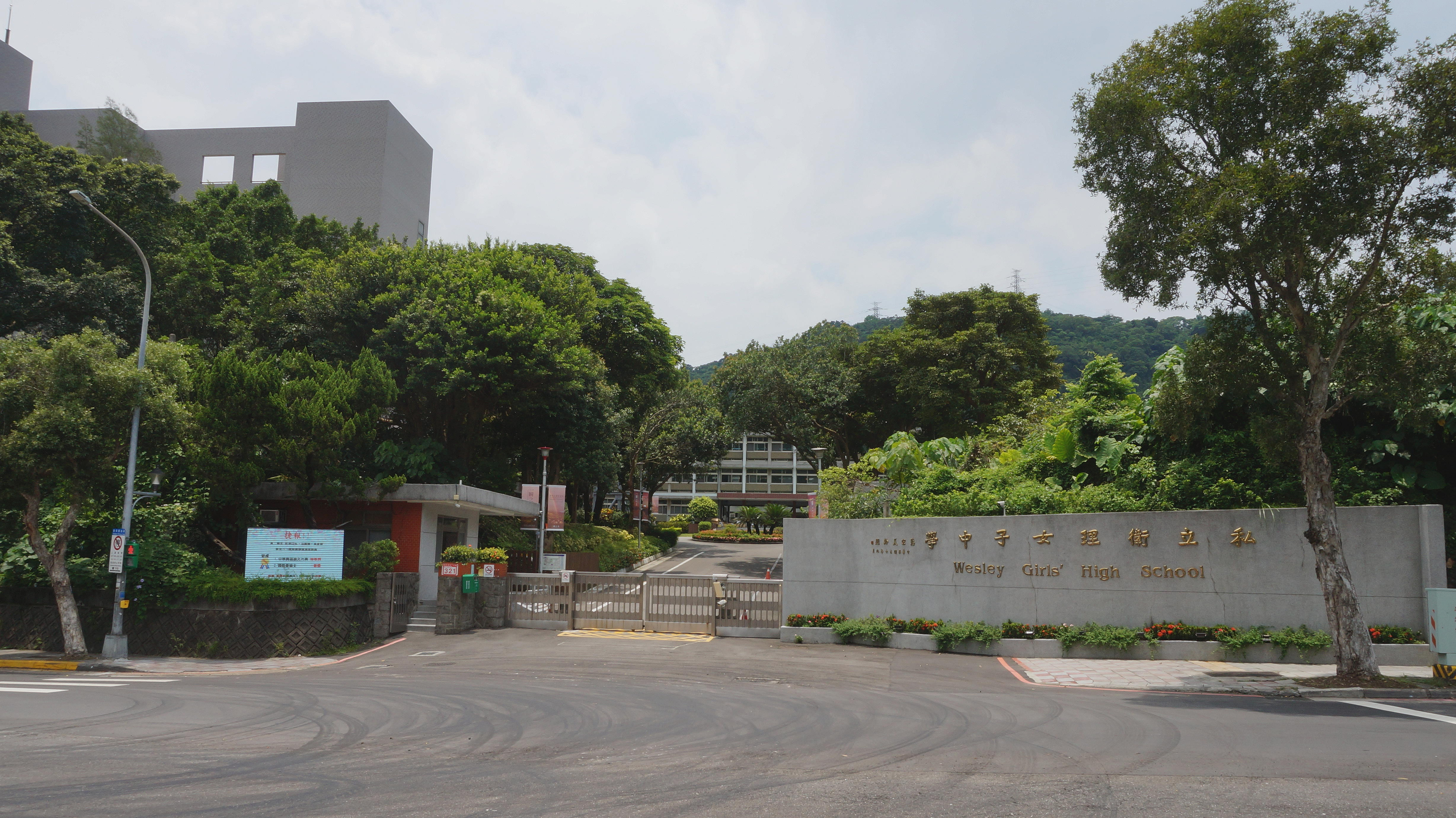 臺北市私立衛理女子高級中學大門，面向臺北市士林區至善路二段。